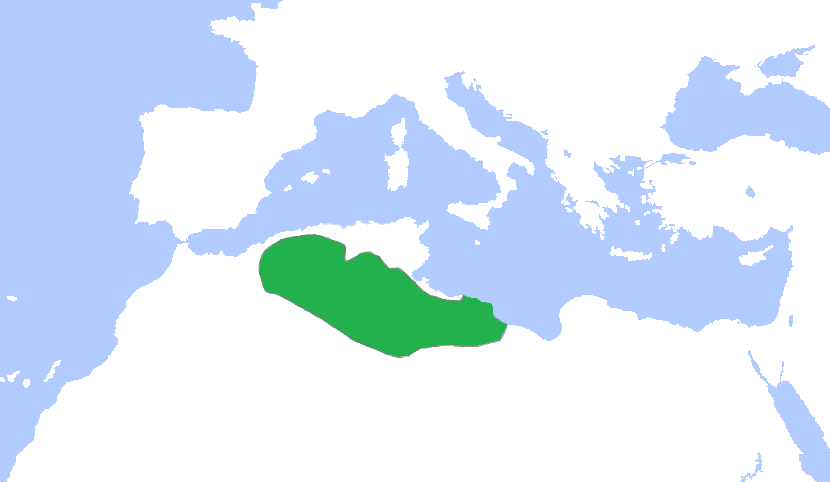 Rustamid_900.png Euratlas